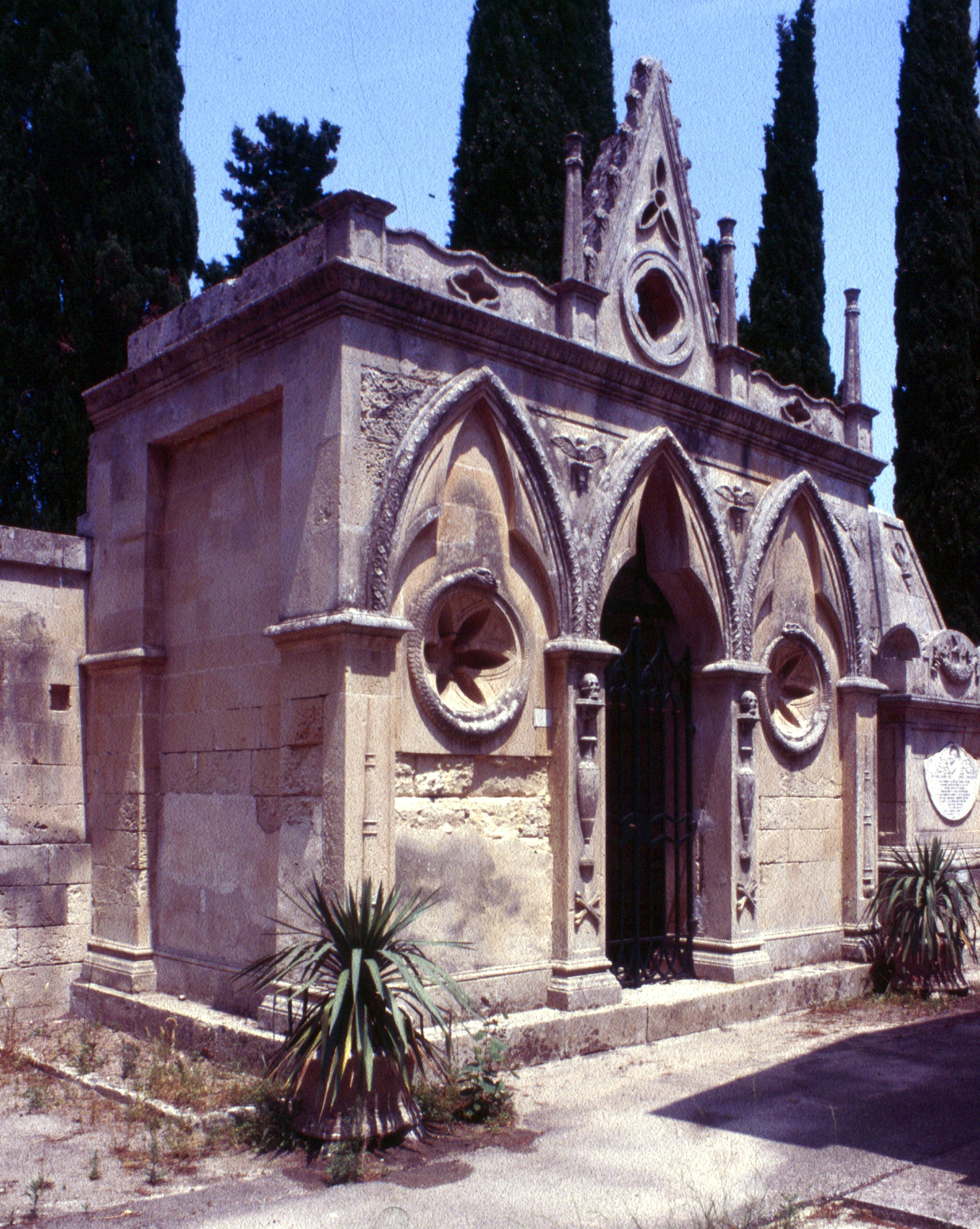 Santi Niccolò e Cataldo (Lecce)